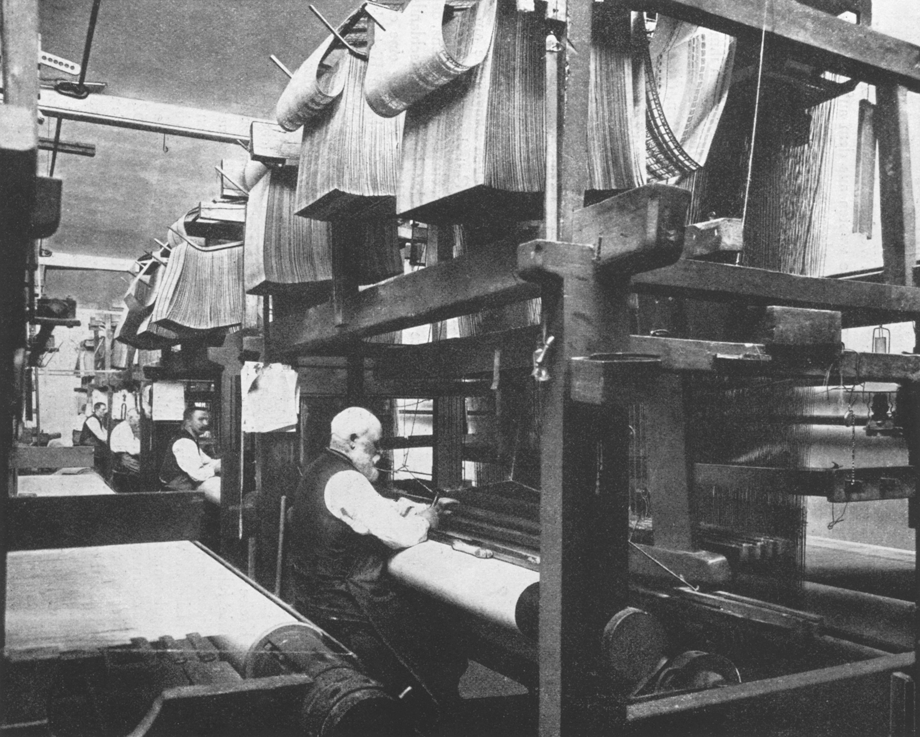 Jacquardwebstuhl der Firma Kisker in Bielefeld (Damastweberei)